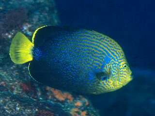 Chaetodontoplus chrysocephalus en Izu Oceanic Park, Japón